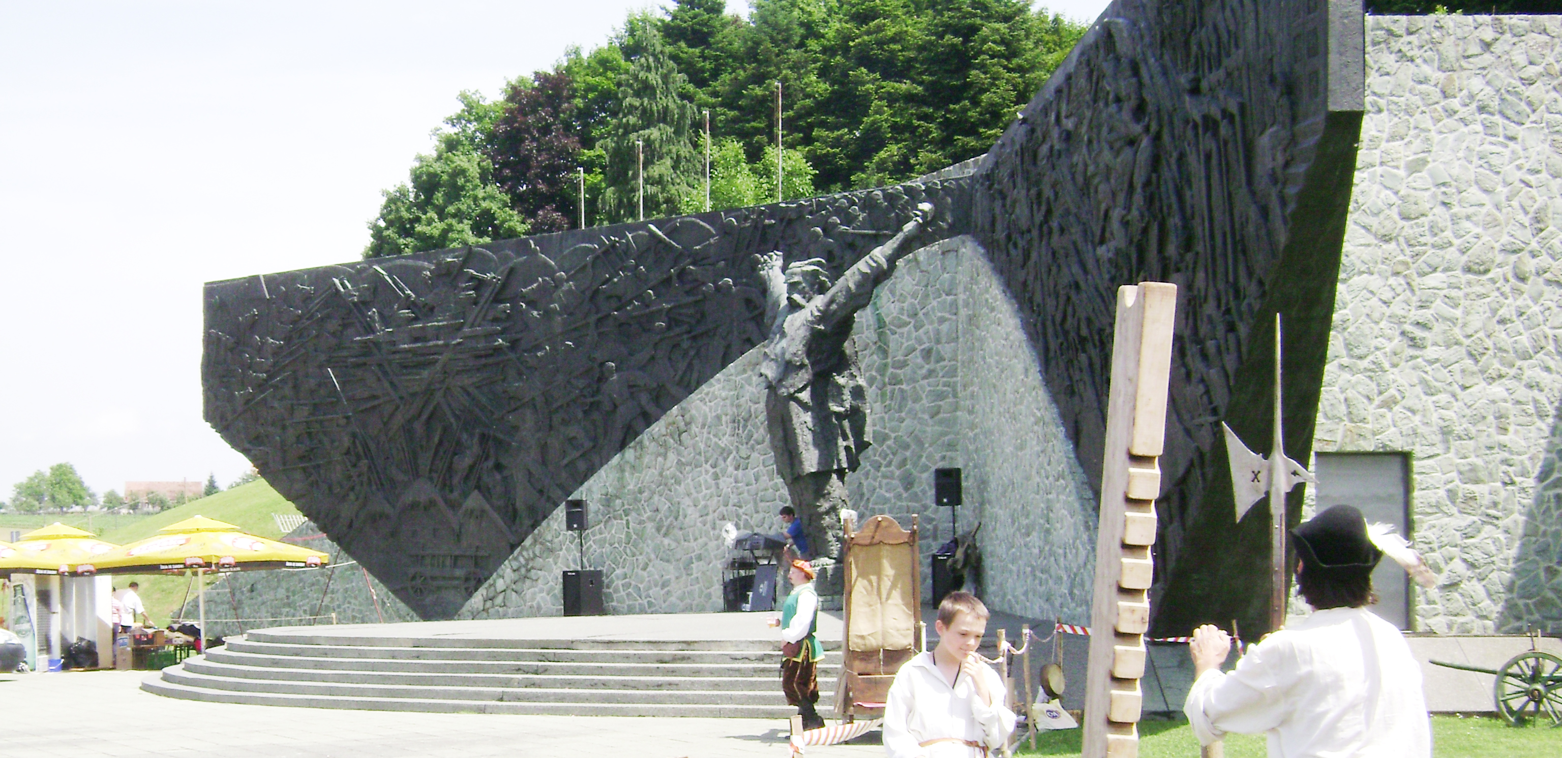 monument in stubica